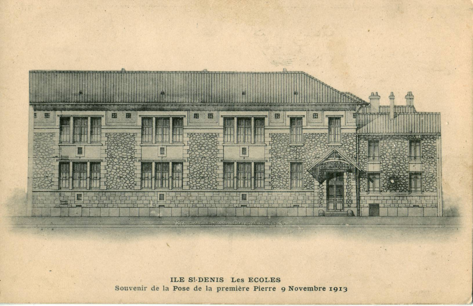 Carte postale ancienne, sans mention d'éditeur : ÎLE-SAINT-DENIS - LES ECOLES - Souvenir de la pose de la première pierre - 9 novembre 1913